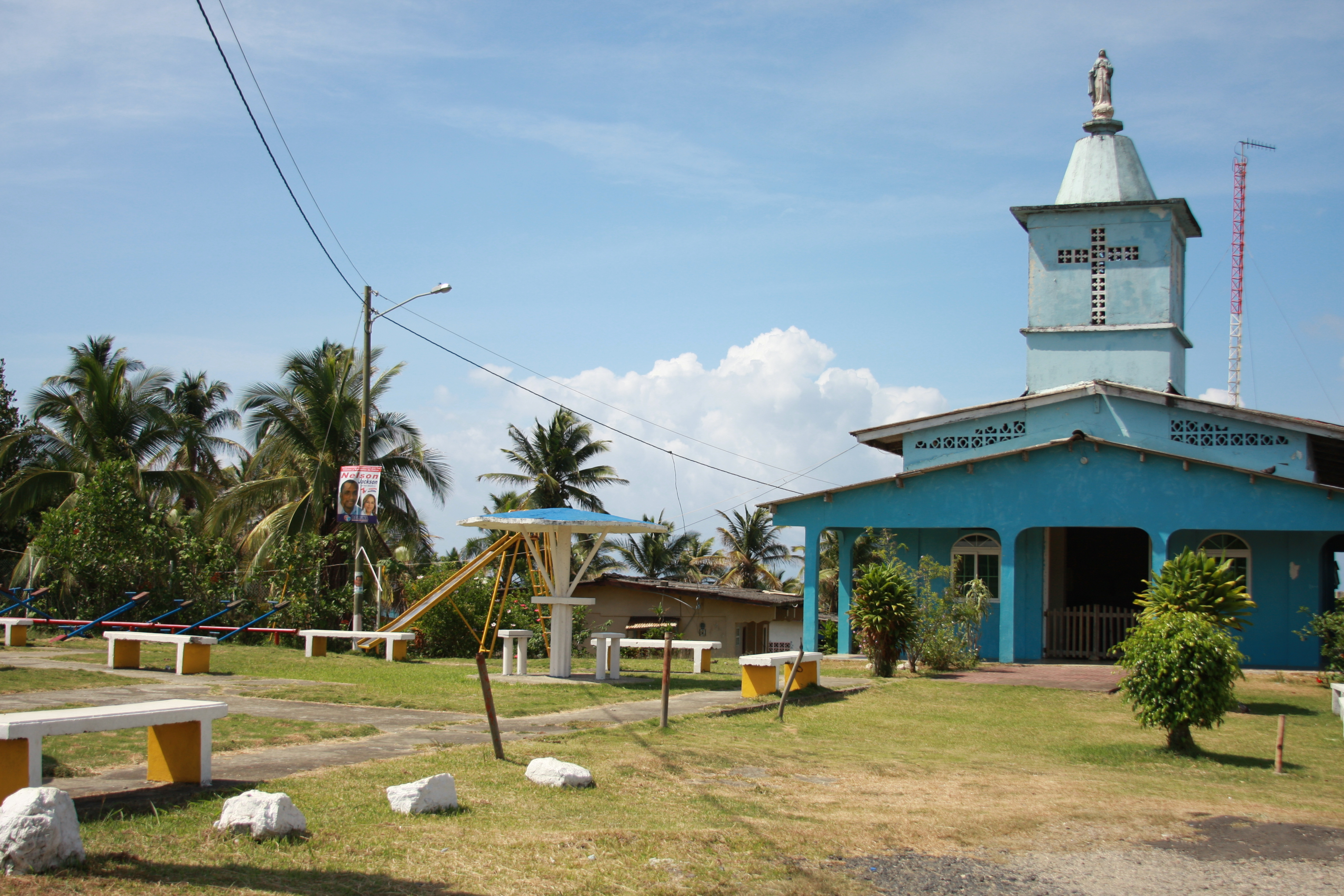 Parroquia rural en Río Indio, Colón